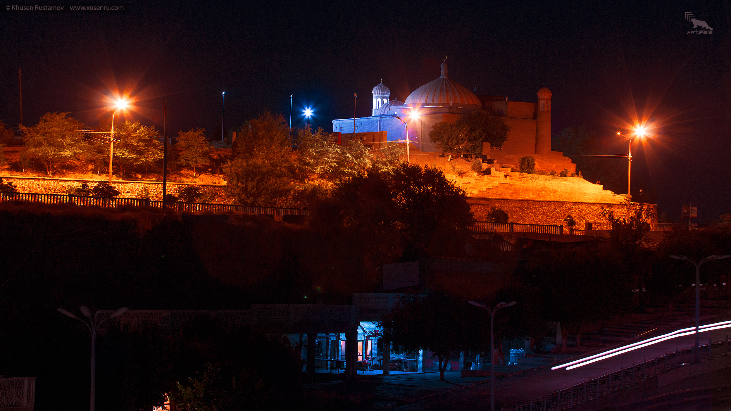 Uzbekistan, Samarqand - Узбекистан, Самаркад By: Khusen Rustamov (Хусен Рустамов) Copyright © ART.IRBIS Production